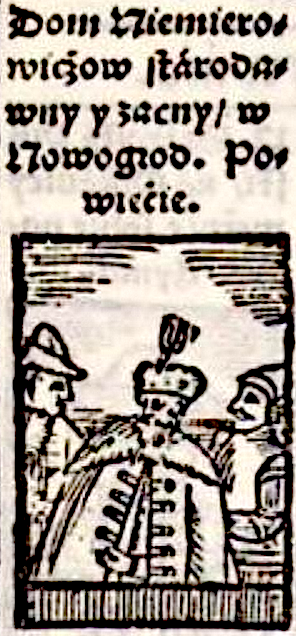 Дом Немировичей стародавний и знатный в Новгородском повете. Рисунок из книги Bartoszа Paprockiego "Gniazdo cnoty: zkąd herby rycerstwa sławnego Krolestwa Polskiego, Wielkiego Księstwa Litewskiego, Ruskiego, Pruskiego, Mazowieckiego, Zmudzkiego y inszych Państw do tego Krolestwa nalezacych Książąt y Panow poczatek swoy maią". Kraków: 1578, s. 1170